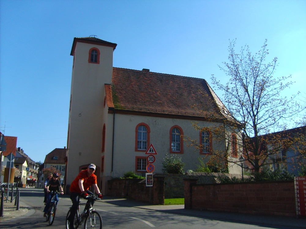 Alte Synagoge in Sandhausen, Germany